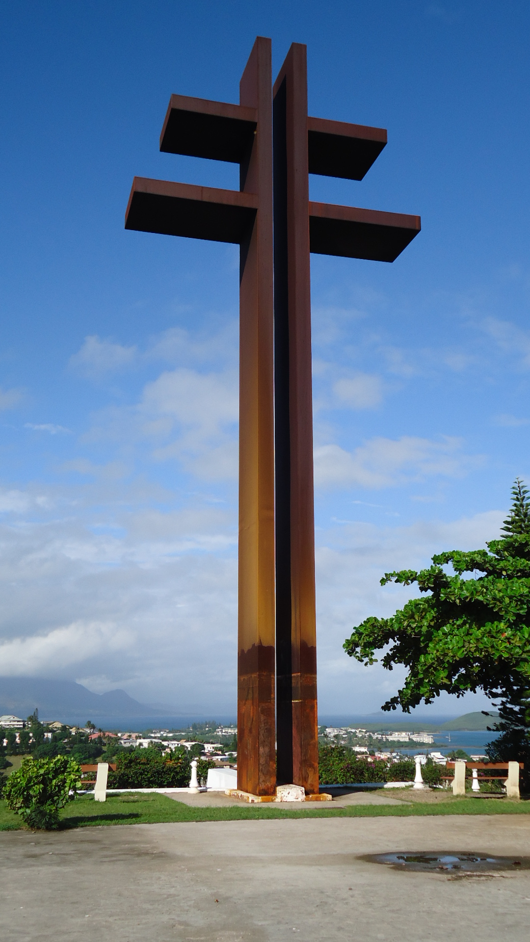 Croix de Lorraine géante située au Mont Coffyn à Nouméa